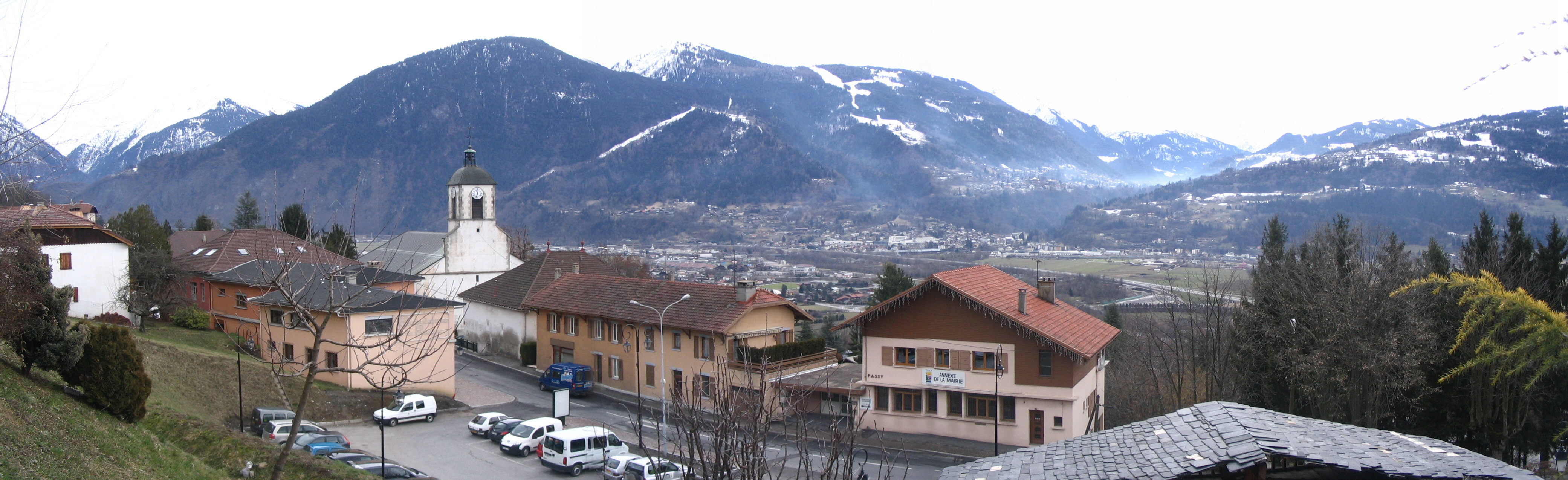 Passy - Haute savoie - France : Eglise St Pierre-Saint Paul, du XVIIIe siècle